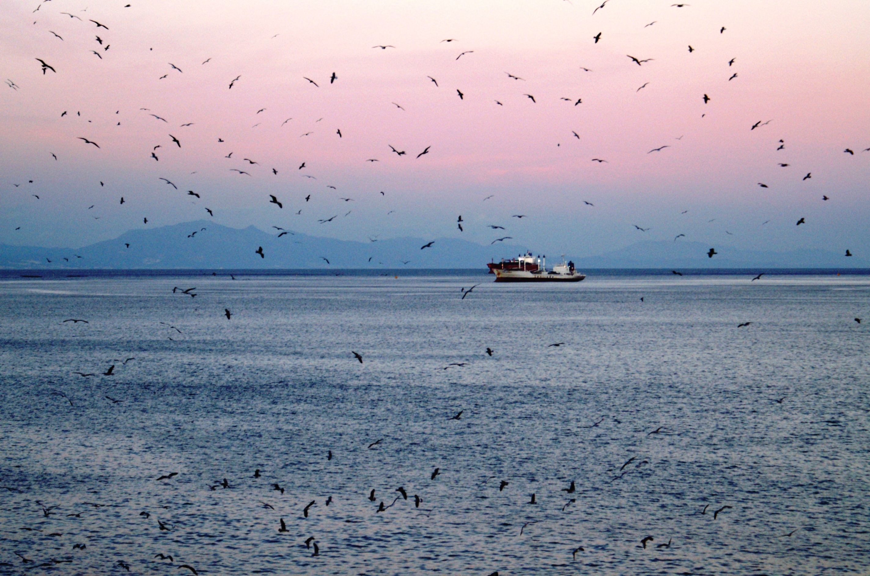 Kust van Gibraltar © DJE